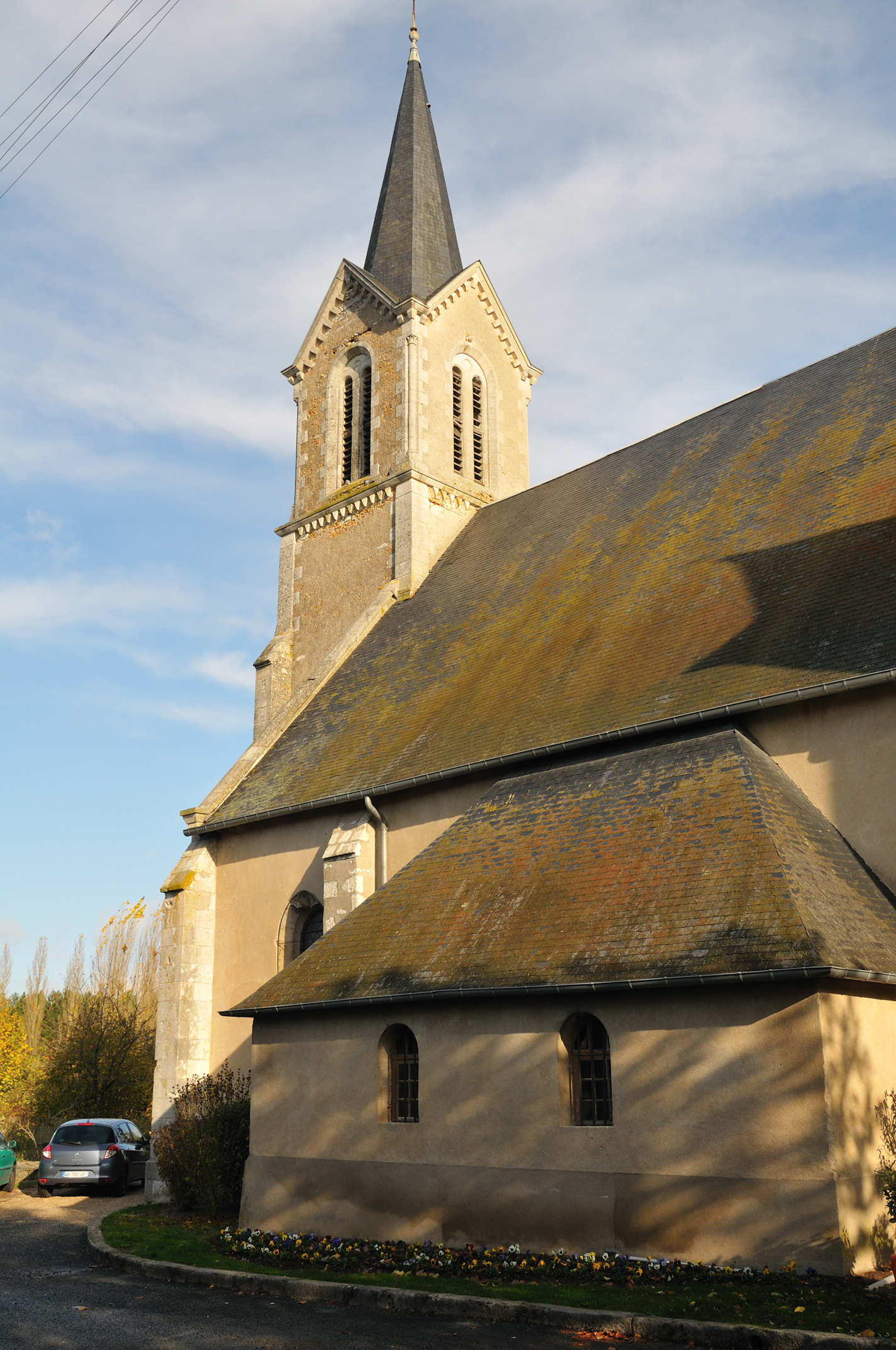 Église Saint-Gondon, Saint-Gondon, Loiret, France